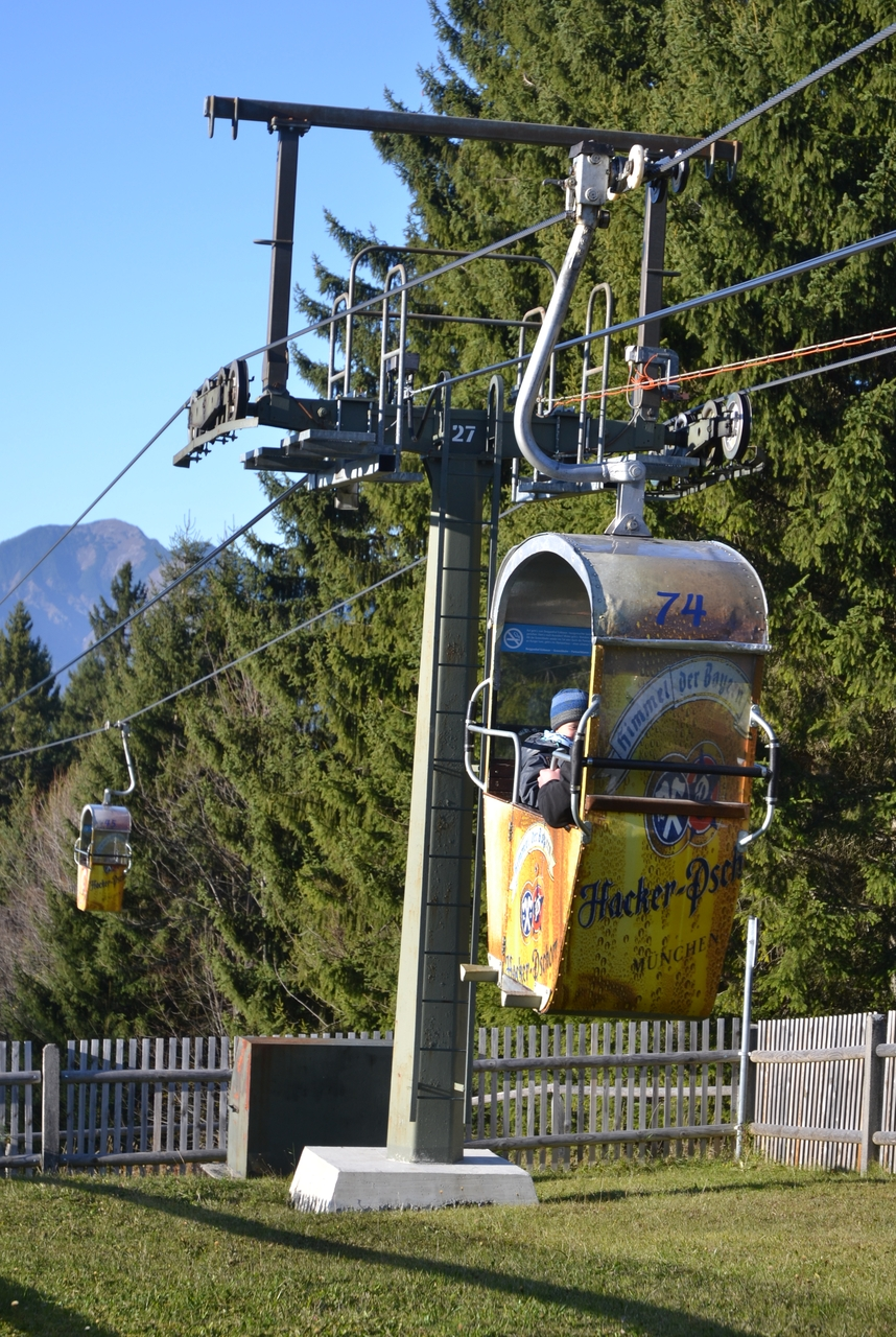 Zwei der historischen Gondeln der Eckbauerbahn nahe der Bergstation. Diese Gondeln bewältigen auch aktuell den gesamten Betrieb.